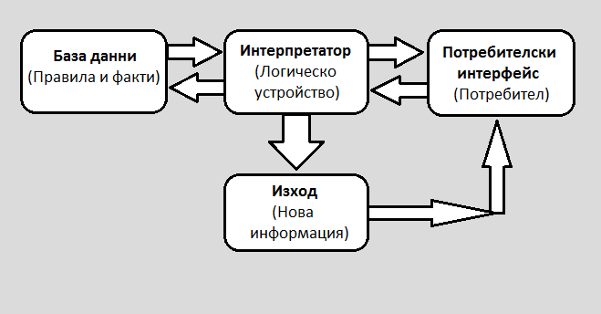 Базова архитектура на експертна система